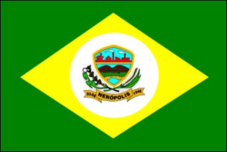 Bandeira de Nerópolis, Goiás, Brasil.